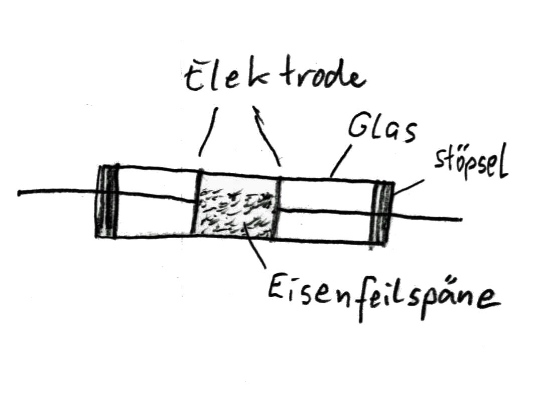 Fritter (Coherer)